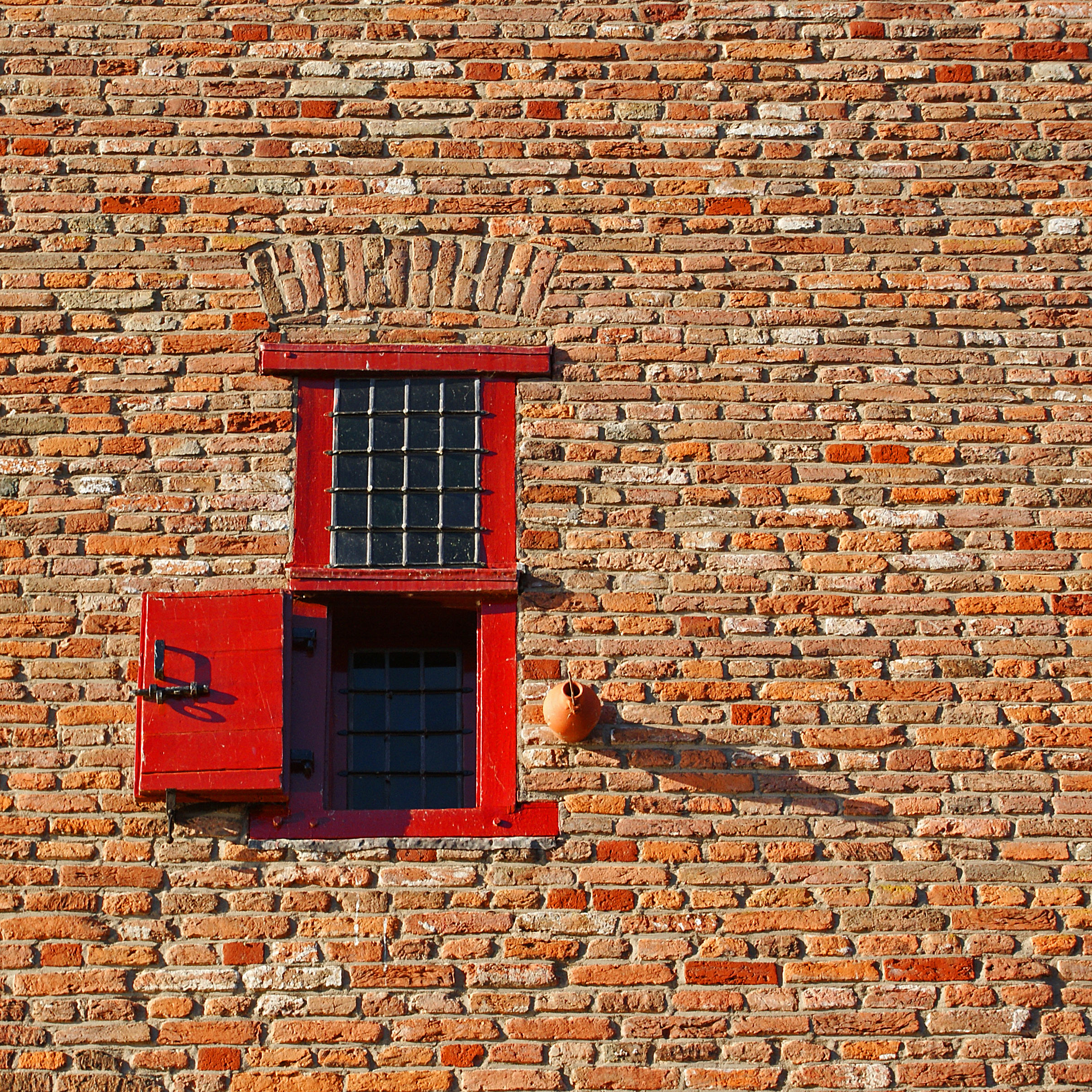 Slot Loevestein. Website Slot Loevestein View On Black